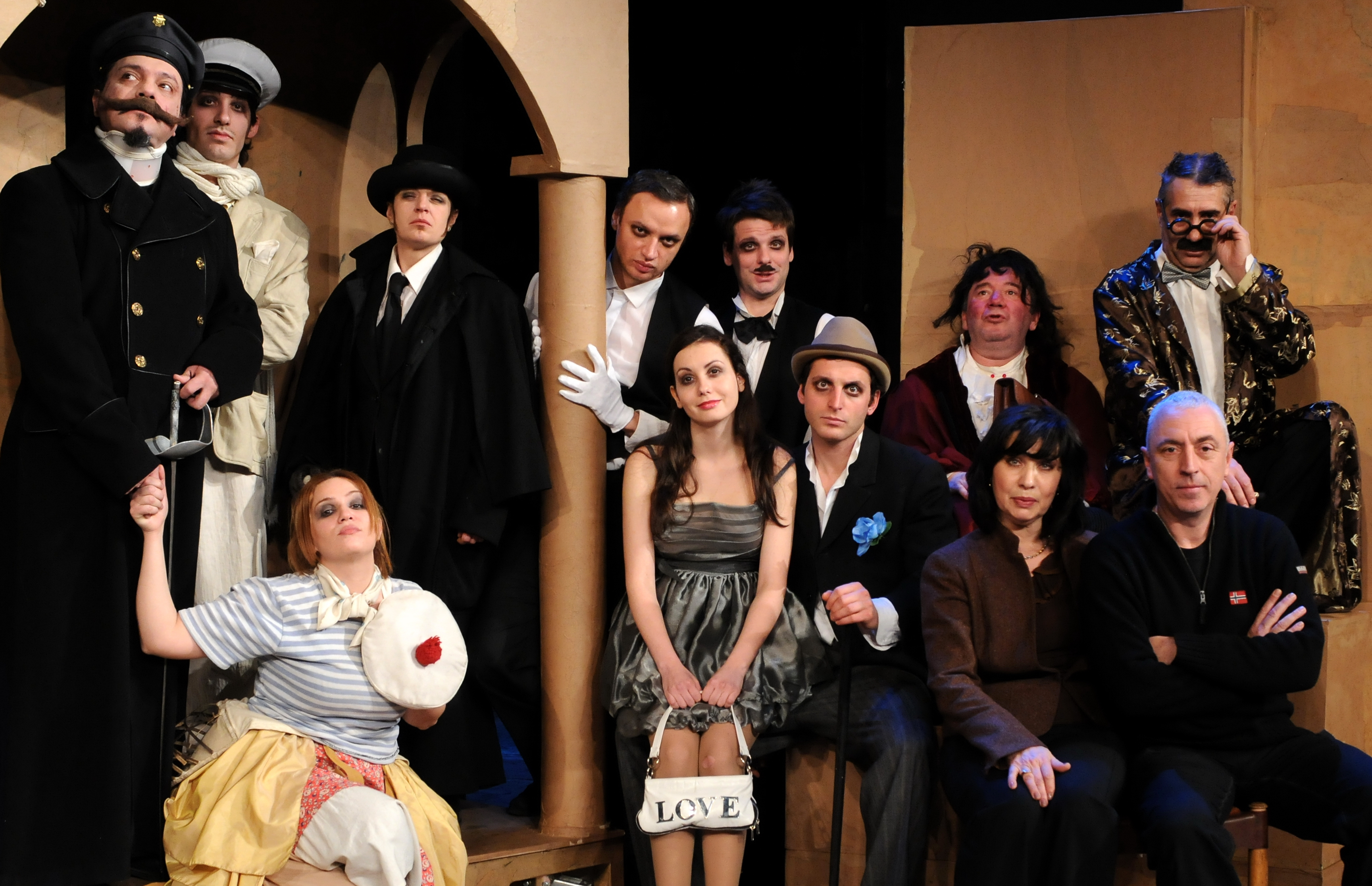 עם הקאסט של "משרתם של שני אדונים" תיאטרון הלאומי בולגריה-צלם אטנאס קאנצ'ב 2009 (Atanas Kanchev)